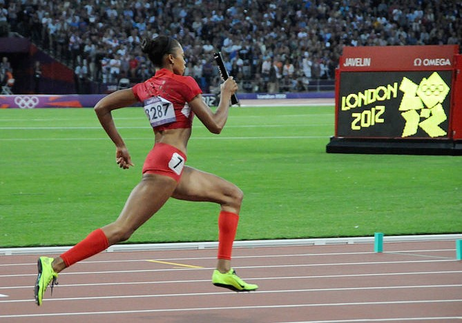 Allyson Felix courant comme deuxième relayeuse le relais américain vainqueur du 4x400 aux jeux olympiques de Londres 2012